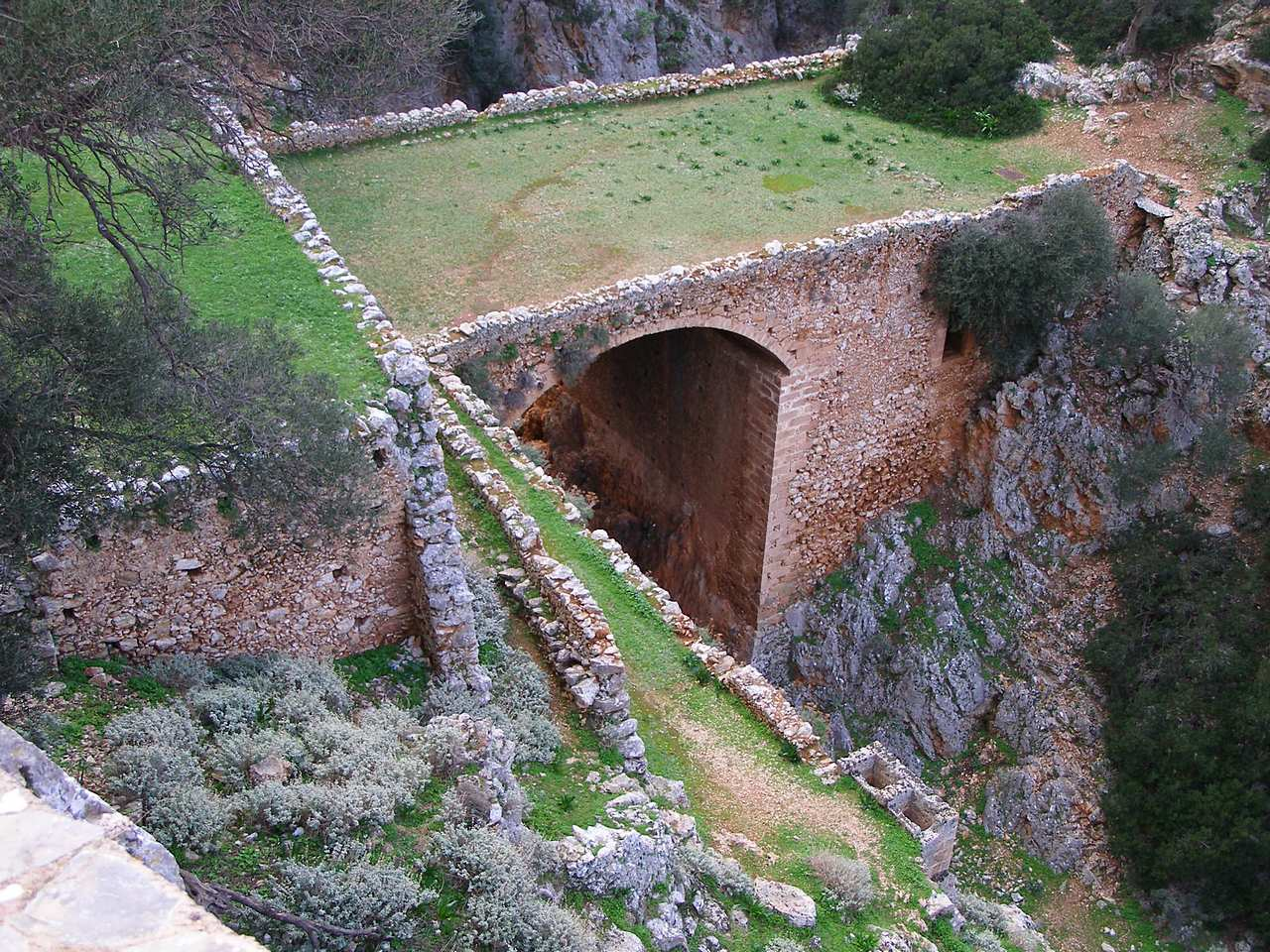 Brücke des Klosters Katholiko auf der Halbinsel Akrotiri